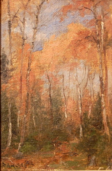 Painting by Fredrik Ahlstedt